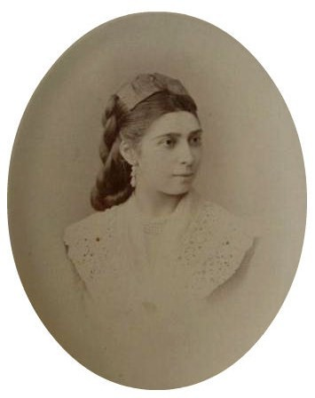 Елизавета Николаевна Гончарова, ур. Герштенцвейг (21.02.1845—25.11.1907).